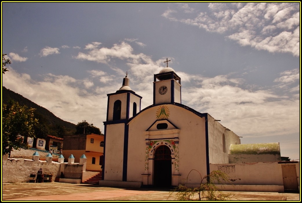 Templo Nuestra Señora de la Candelaria,Aquila,Aquila,Estado de Veracruz,México